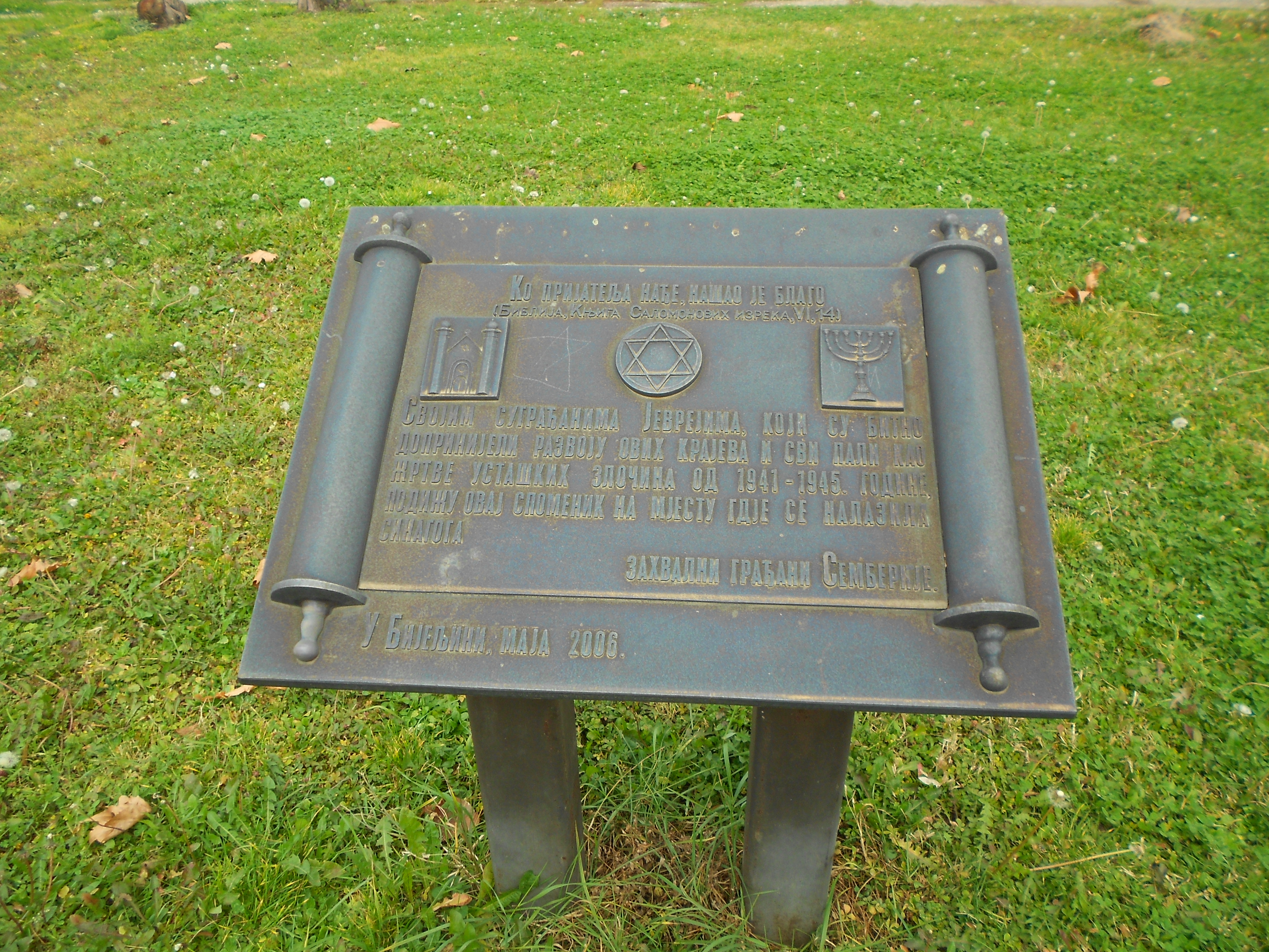 Споменик Јеврејима на мјесту бицше Синагоге у Бијељини